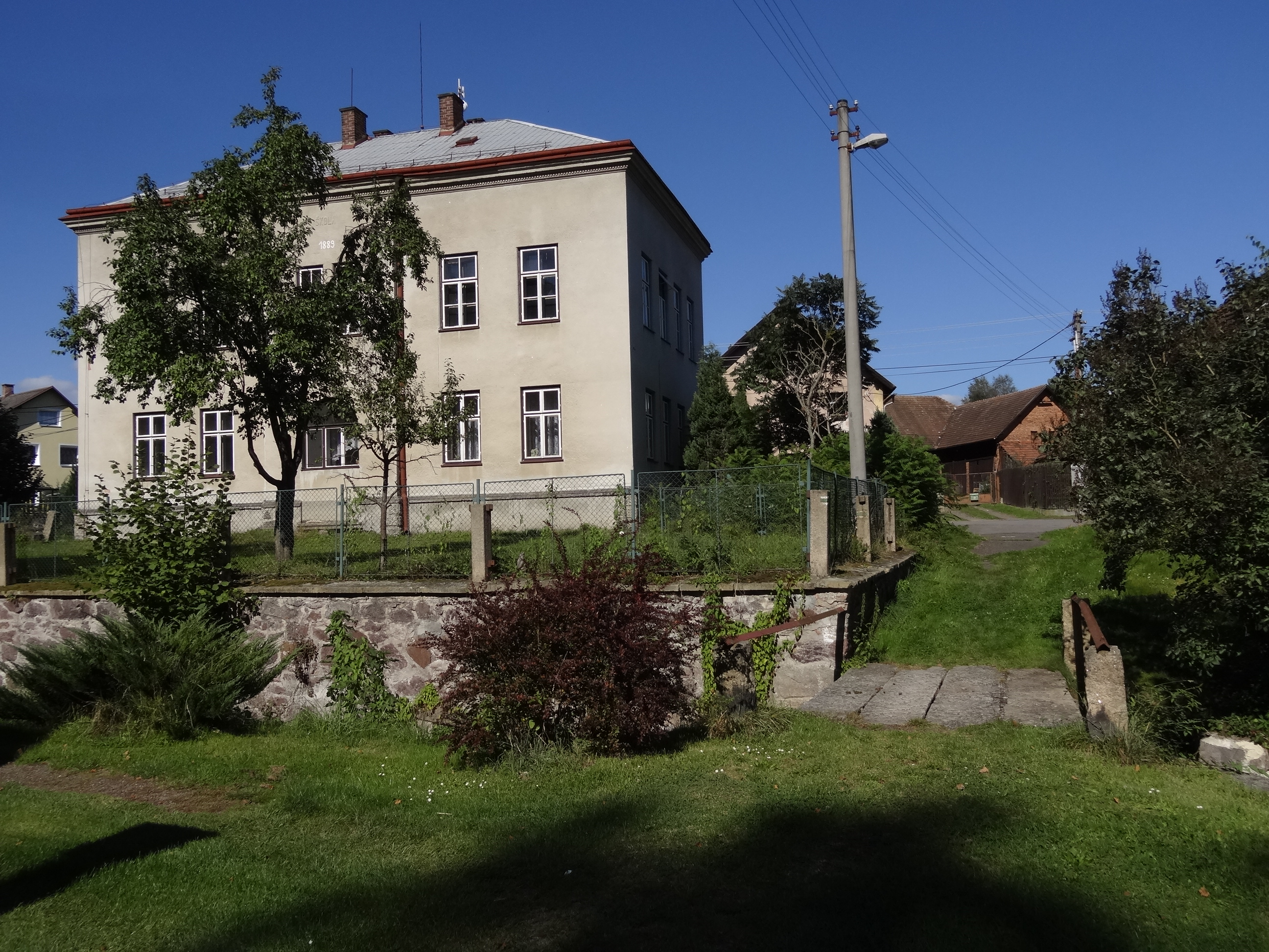 Petrašovice - škola čp. 51 a můstek přes Bystrou